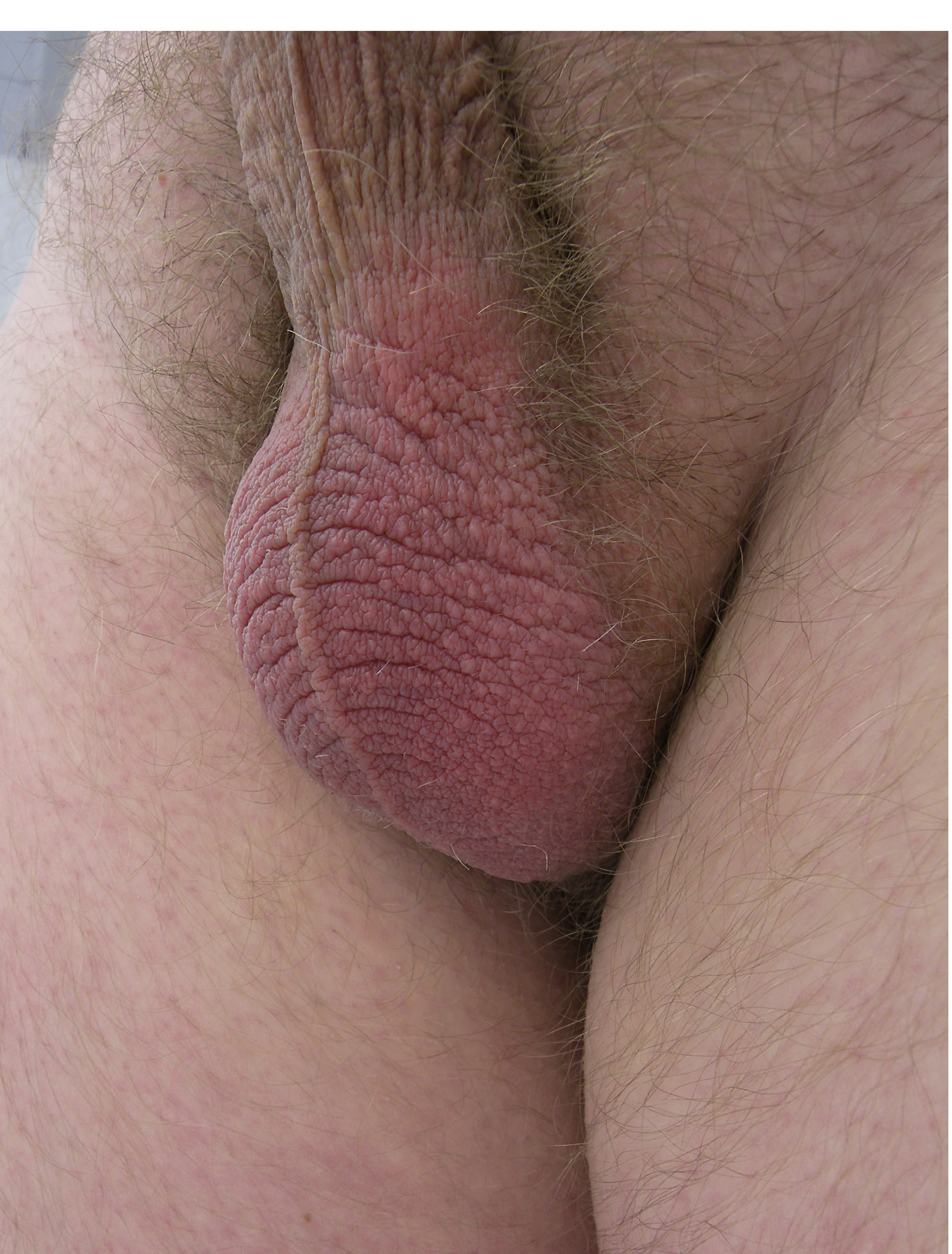 Hoden in rasiertem Hodensack und Haut des Hodensacks